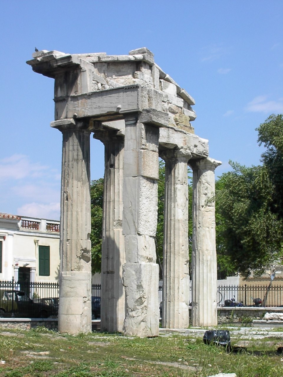 Puerta de Atenea Archegetis, entrada al Ágora romana de Atenas.